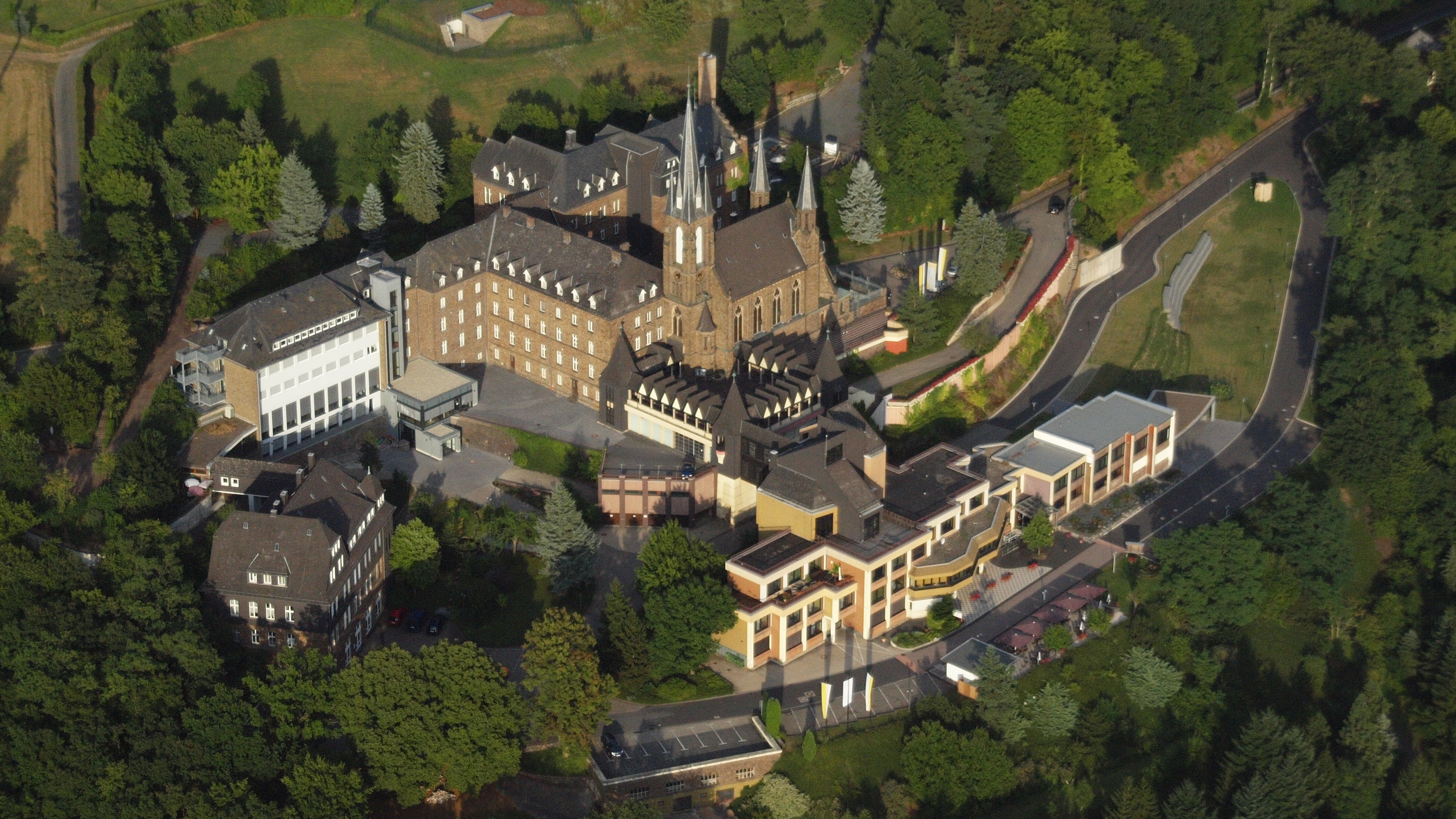 Kloster Marienhaus, Waldbreitbach: Luftaufnahme